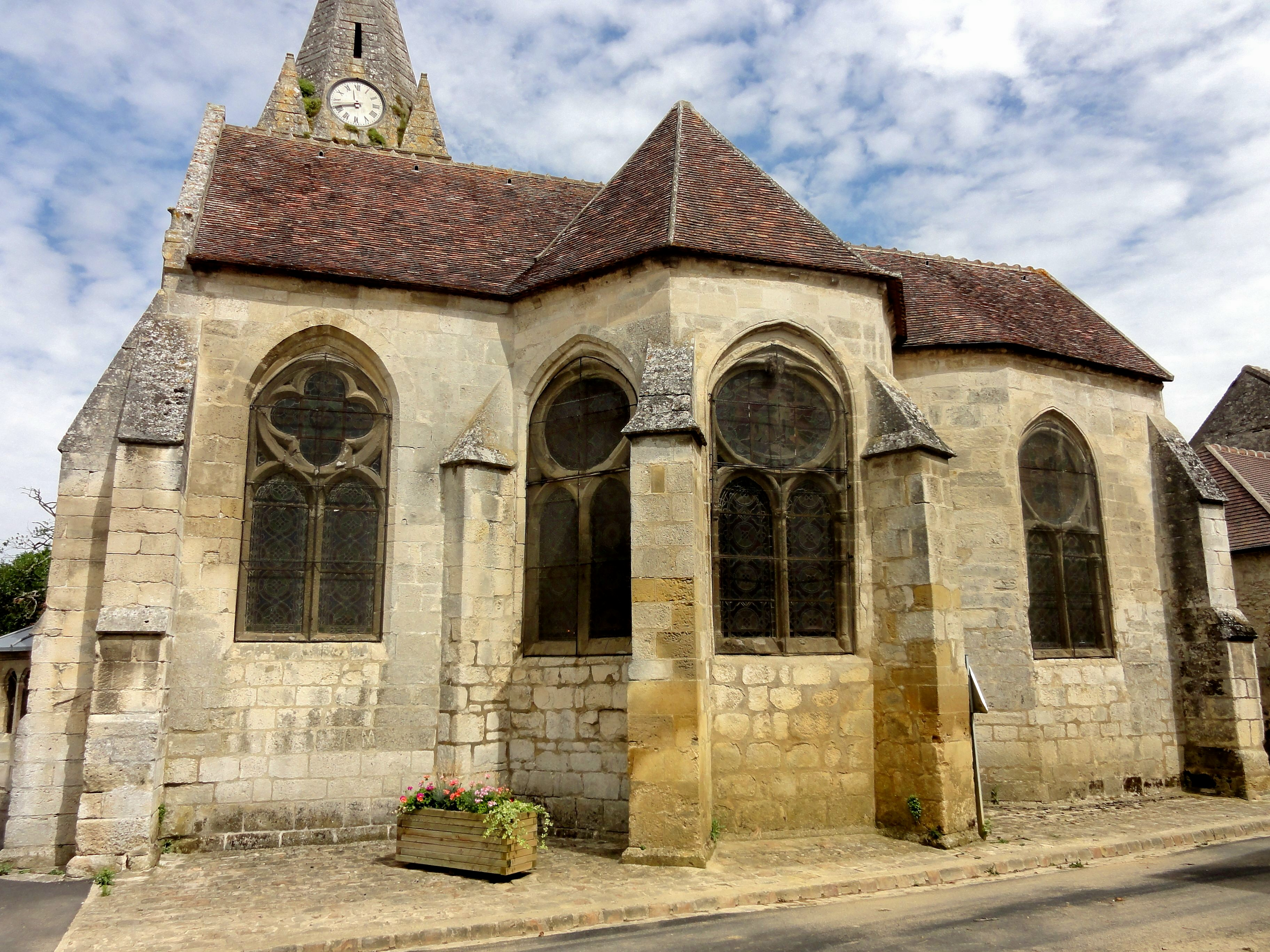 Chevet.